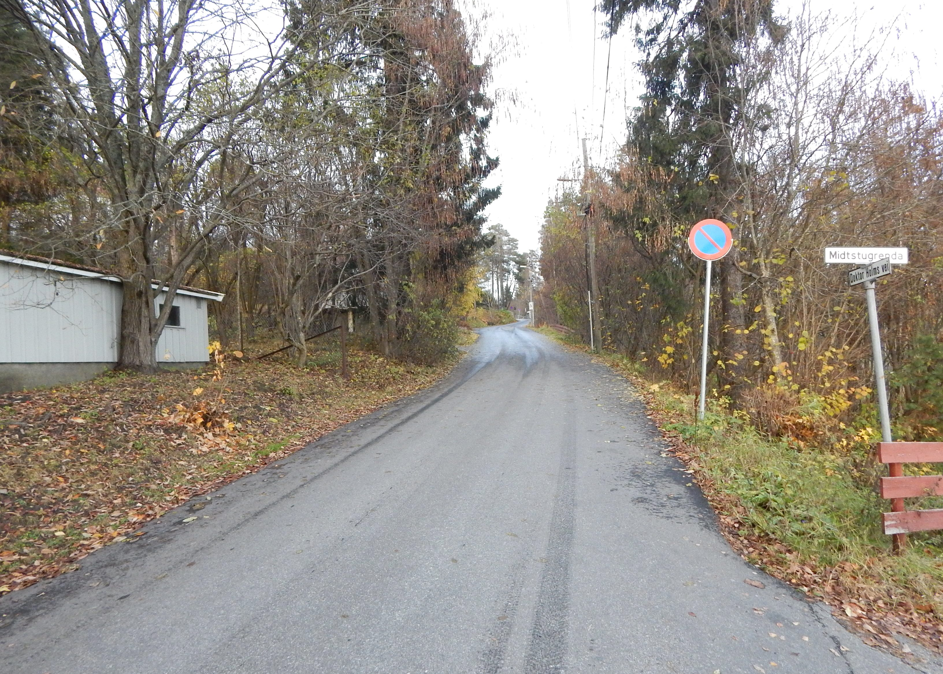 Doktor Holms vei